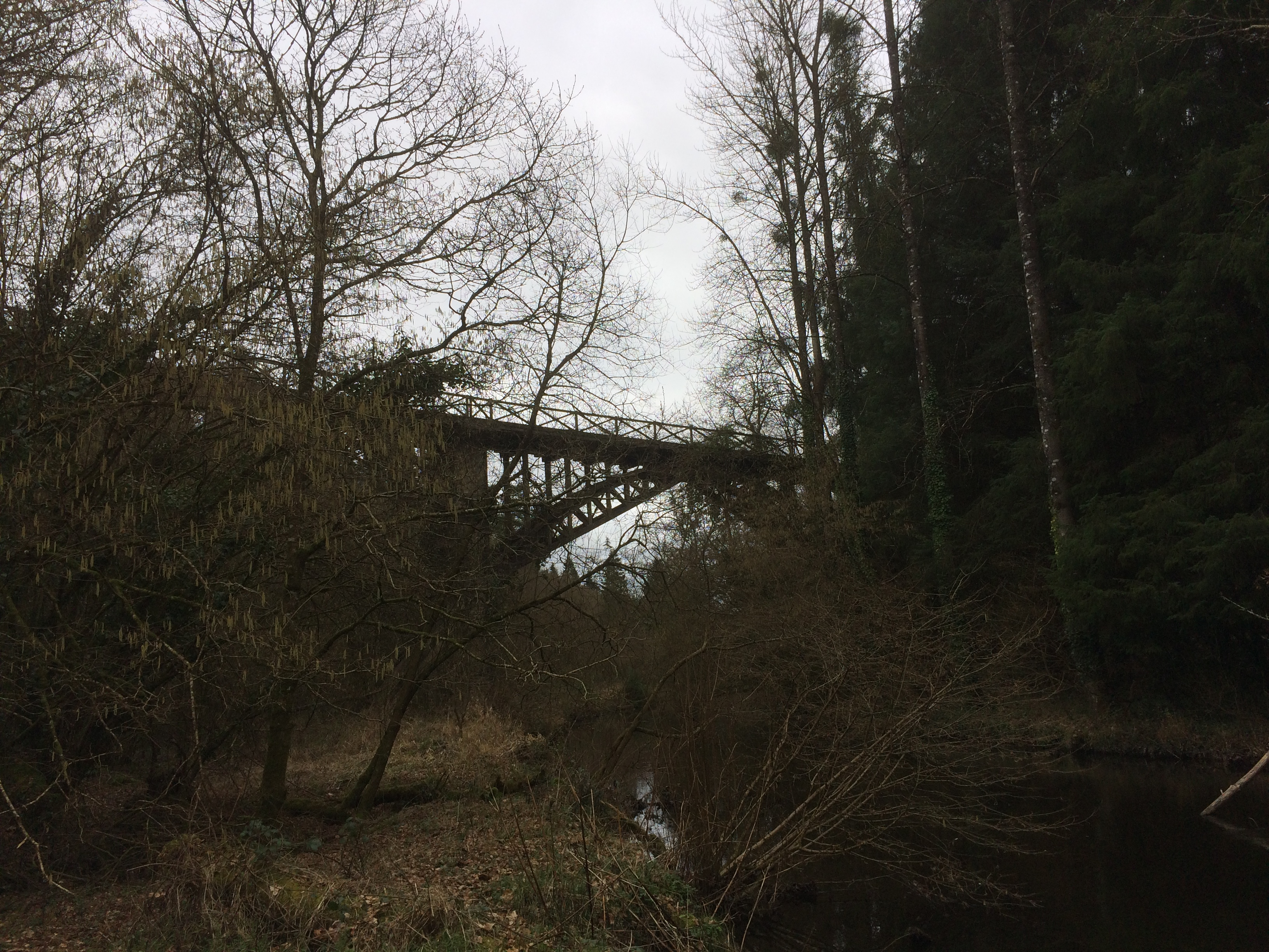 Pont Kerlosker war an Trev etre parrezioù Plouvagor ha Koadoud